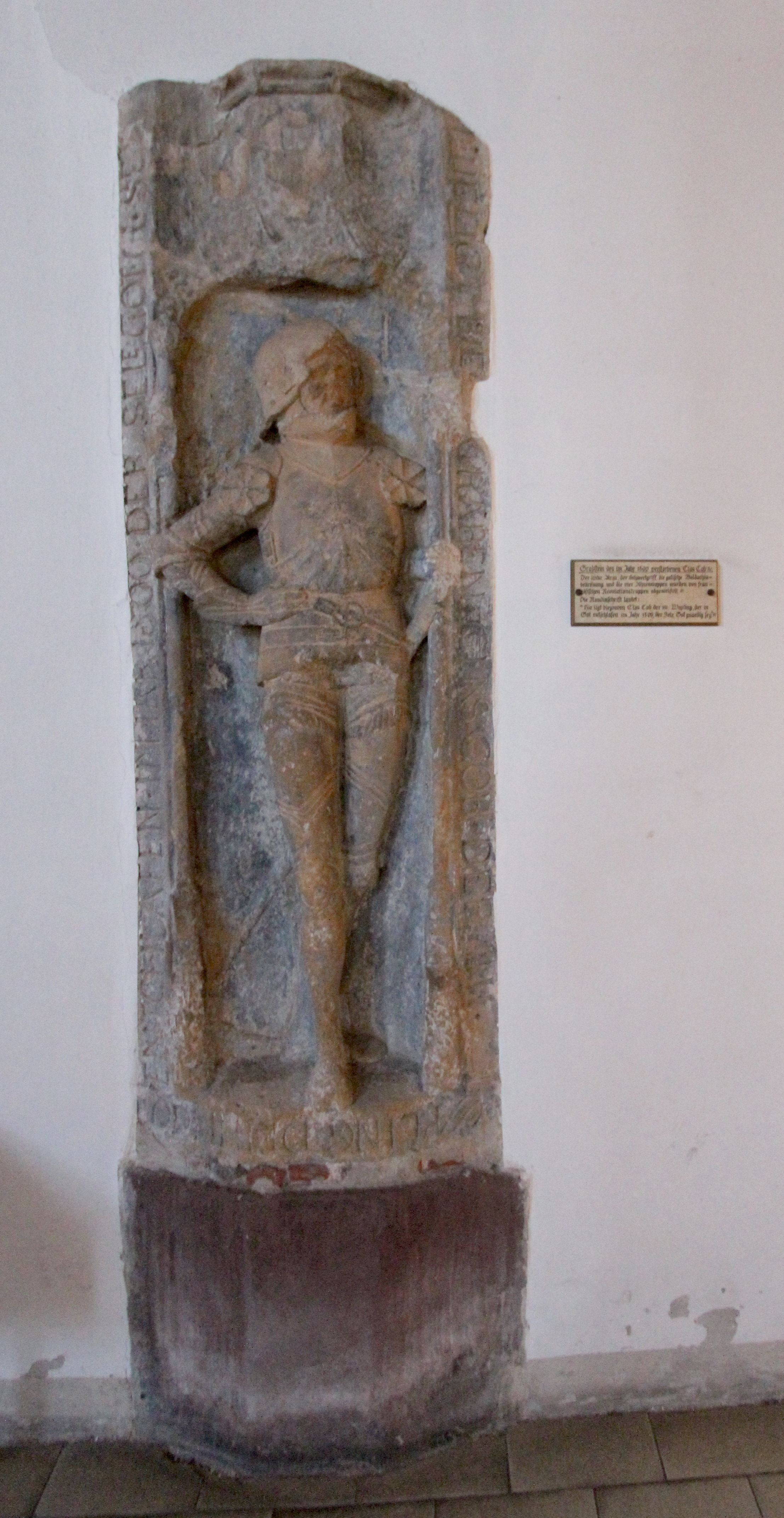 54634 Bitburg, Rathausplatz. Im Kern spätgotischer Saal, Erweiterung zu dreischiffiger Halle mit Westturm 1860, Architekt Alexander Franz Himpler, lotrechte, barockisierende Erweiterung, 1922/23, Architekt Eduard Endler, Köln; im Winkel zwischen Alt- und Erweiterungsbau Barockportal, 1751; mit Ausstattung. Das Bild zeigt den Grabstein eines Cob von Nüdingen. Der unbekannte Bildhauer des Grabsteins erschuf auch die Fassade und die Inneneinrichtung des ehemaligen Cobenturms in Bitburg. Aufnahme von 2018.